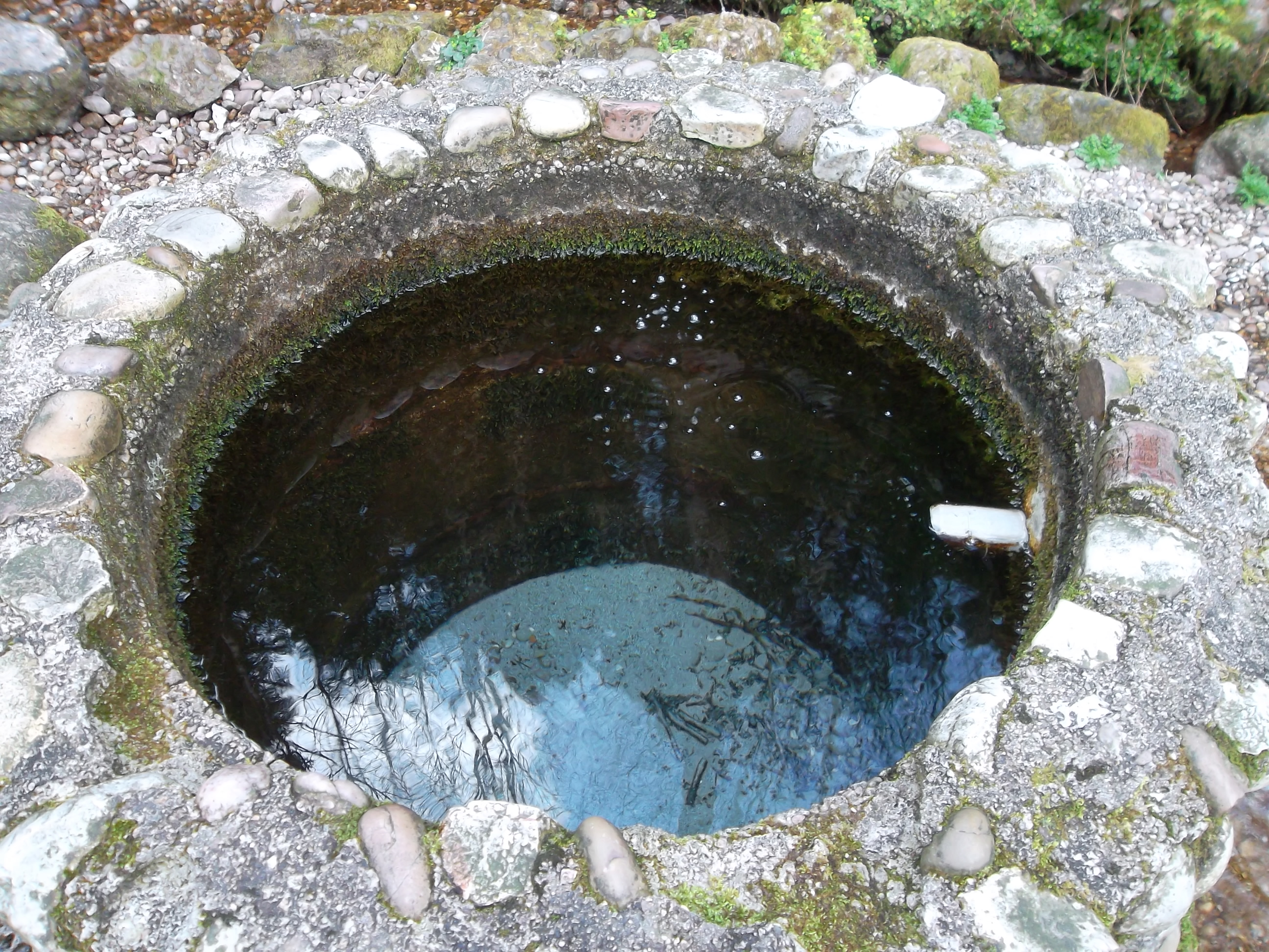 Vasque de la source chaude de Chaudefontaine à Vecoux (Vosges)